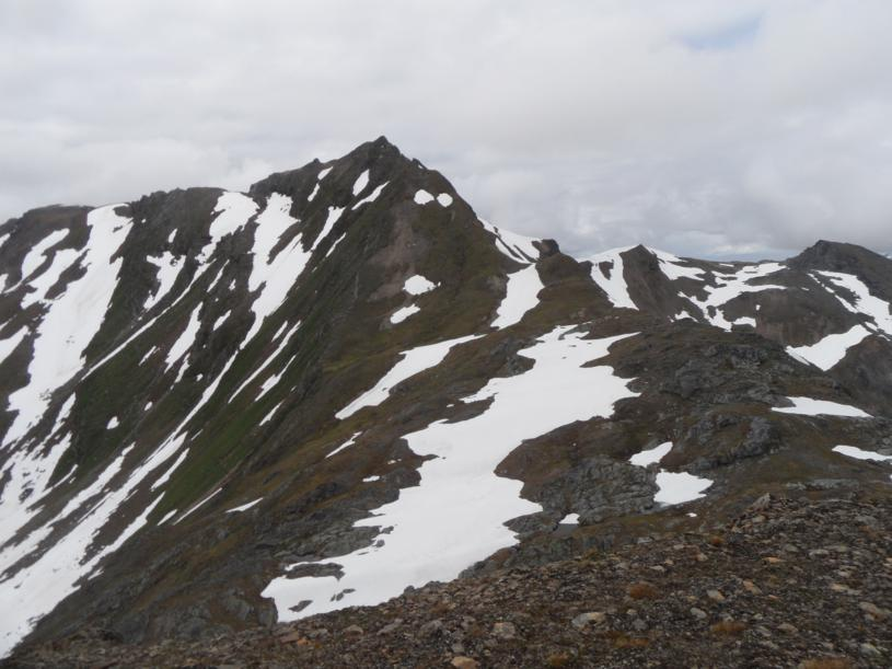 Børingstinden (1094 moh.)